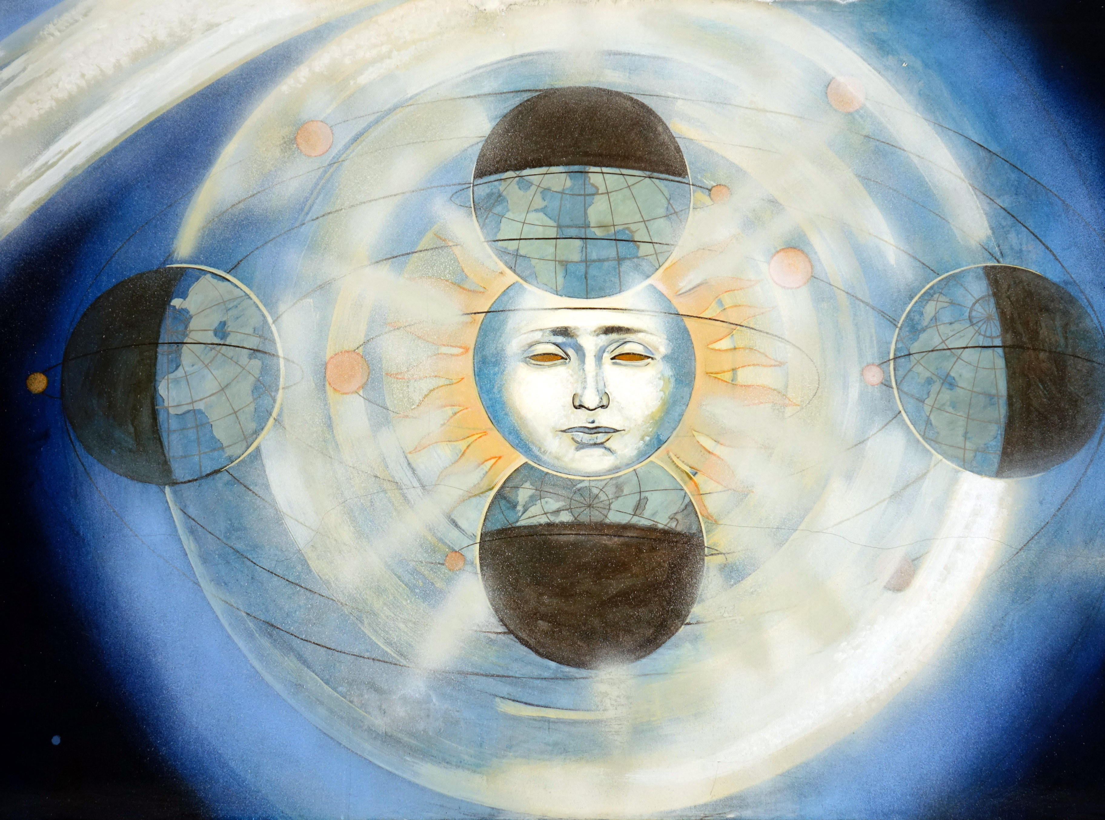 Планетариум ВВМУ Стенопис 4